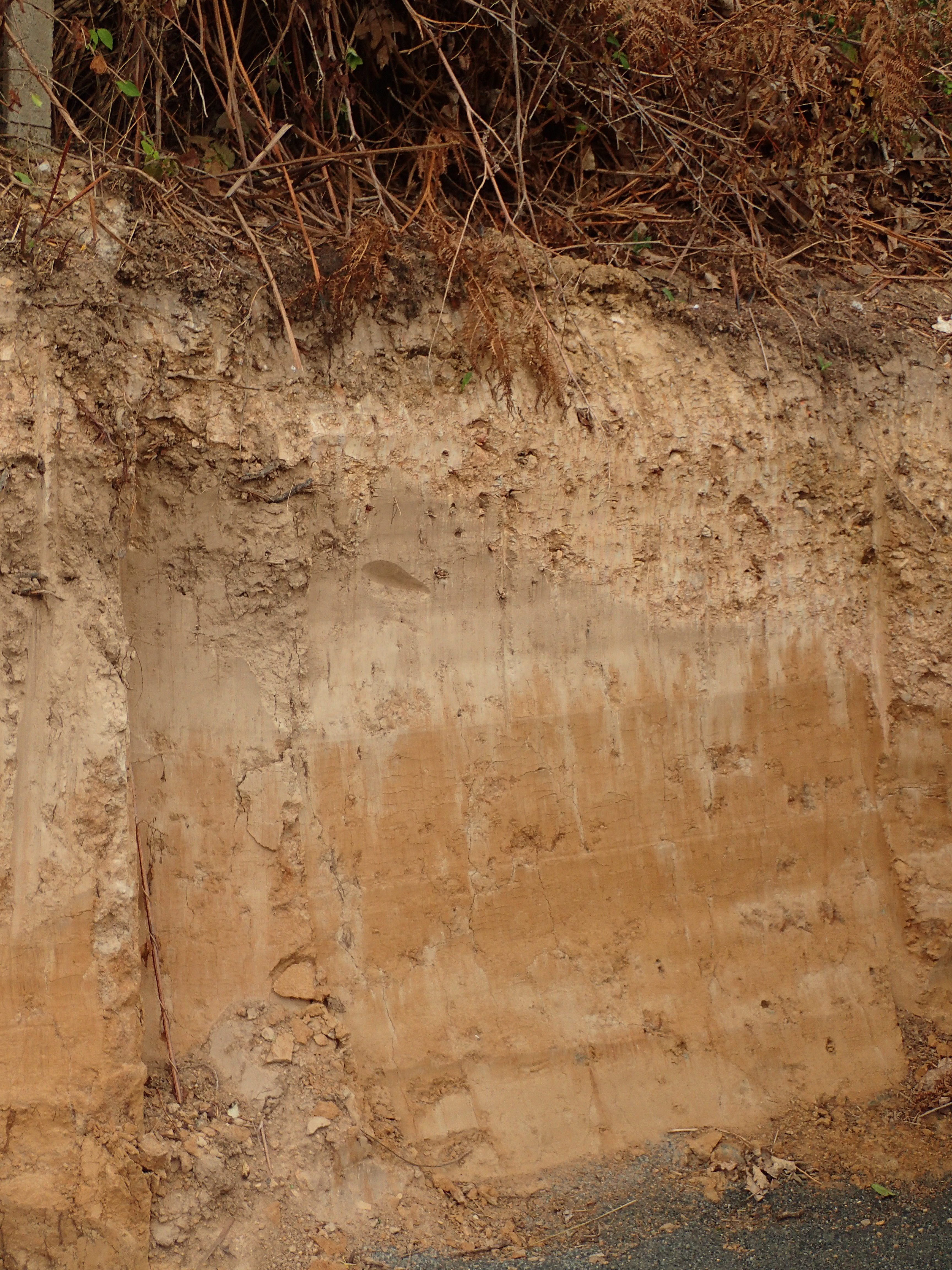 Luvisol dégradé sur limon et granite (La Chapelle-Chaussée, 35)